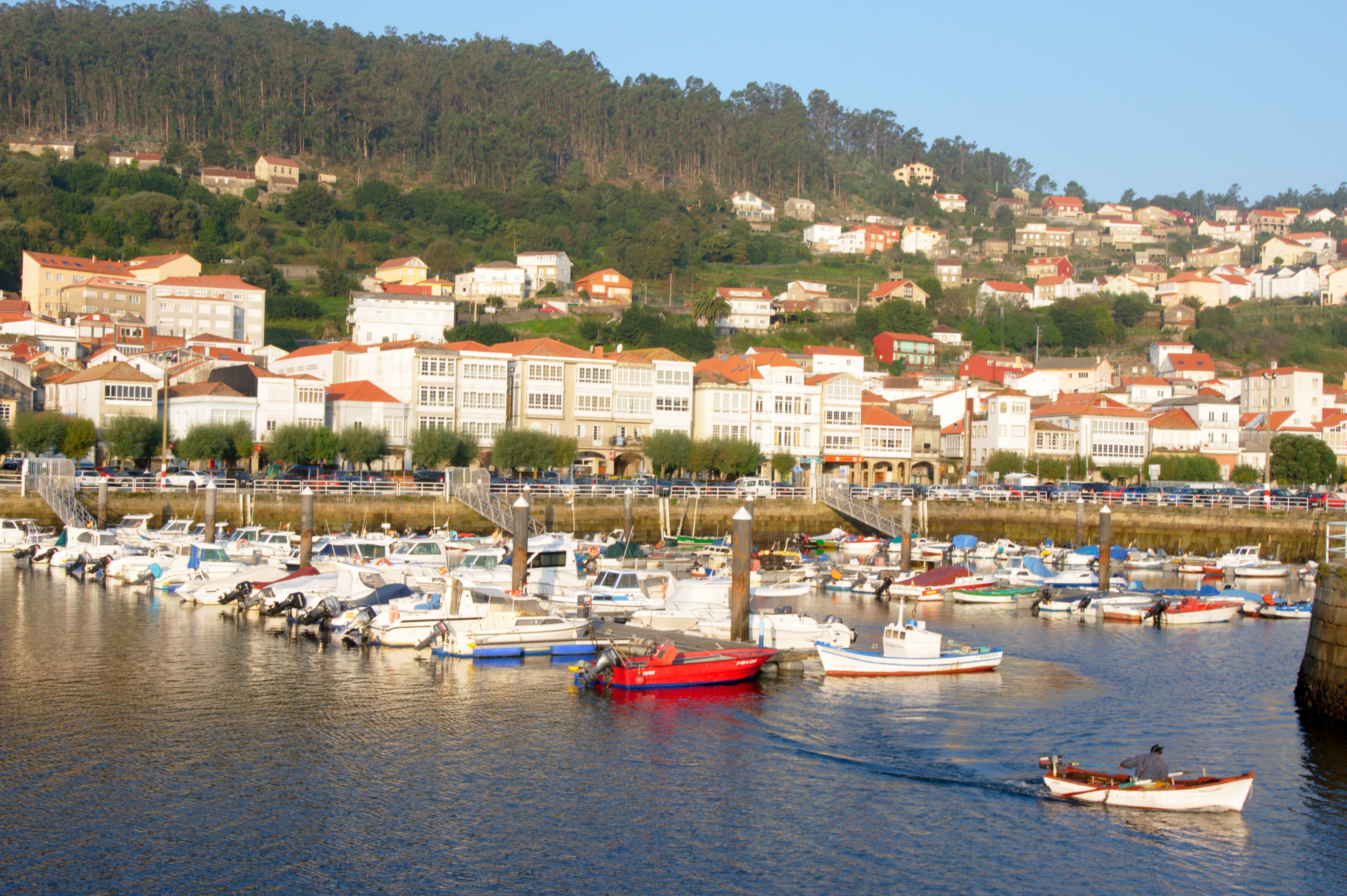 Muros en Galicia